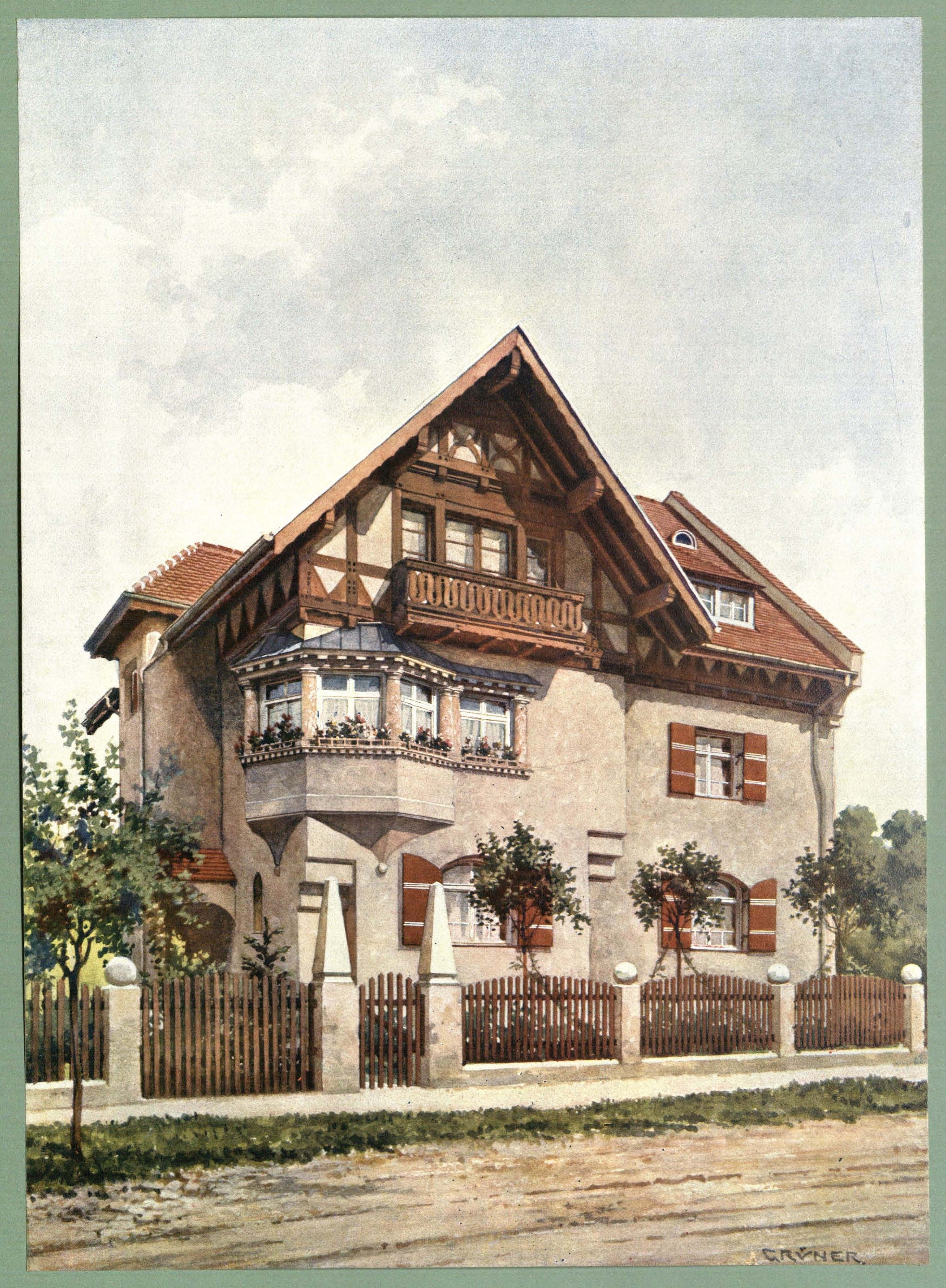 Villa Marschnerstraße 29 (früher Riemerschmidstraße) in München-Pasing, Architekt: August Brüchle. Tafel 16 aus Oscar Grüner: Moderne Villen in Meisteraquarellen. Serie II. 64 Tafeln. Verlag Friedrich Wolfrum & Co. Wien und Leipzig ca. 1905.